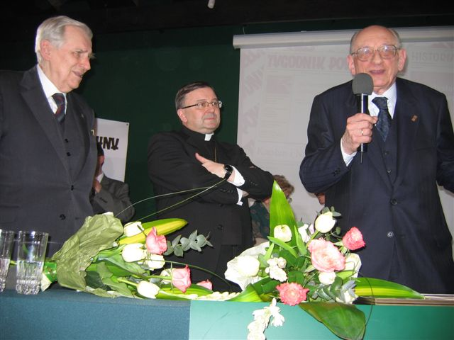 Władysław Bartoszewski (Warsaw, 19.02.1922, - Warsaw, 24.4.2015), Polish historian, publicist, writer and diplomat, and Abp Józef Życiński (1948-2011) and Wiesław Chrzanowski (1923-2012), Polish politician